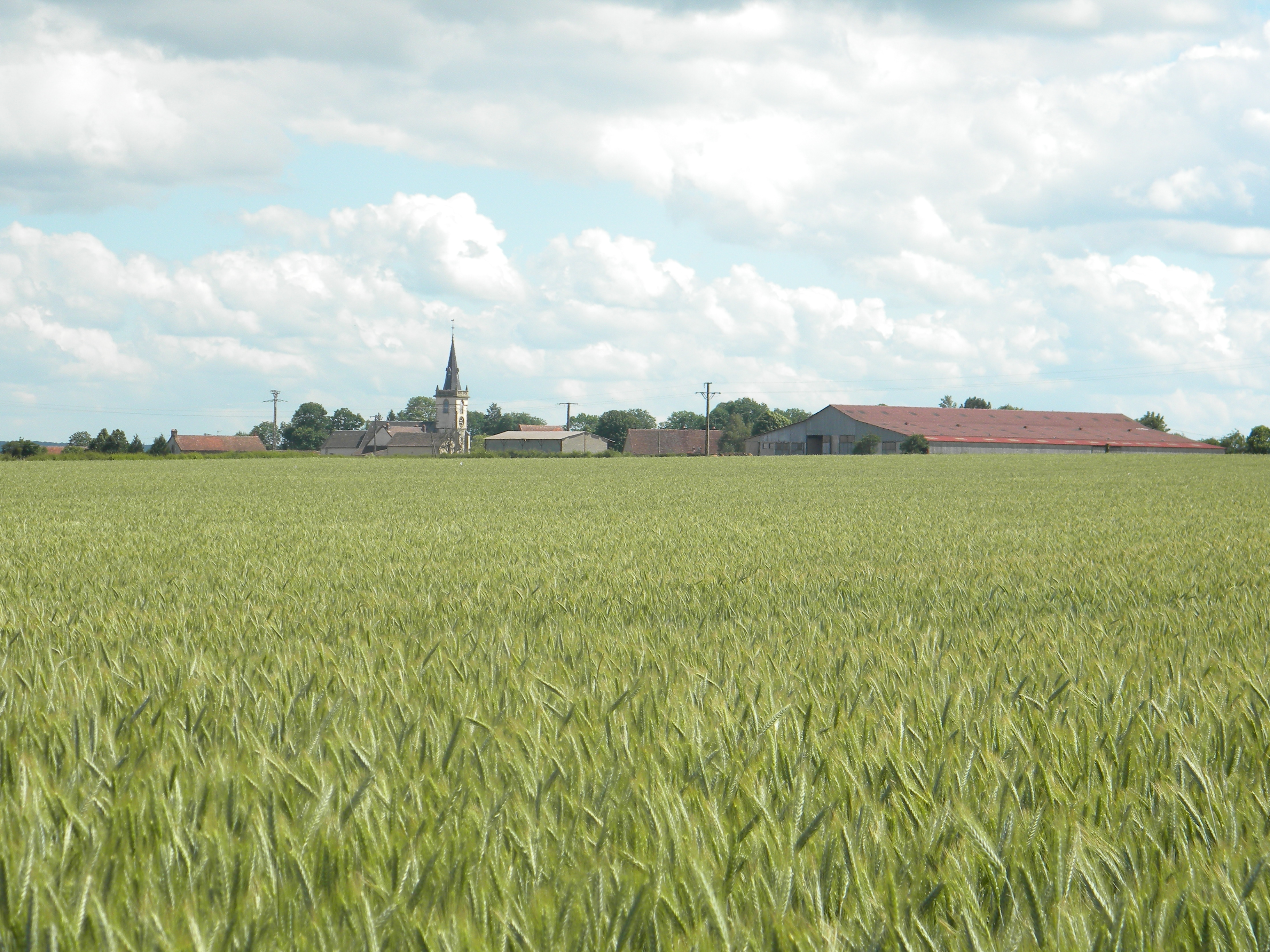 Marcheseuil